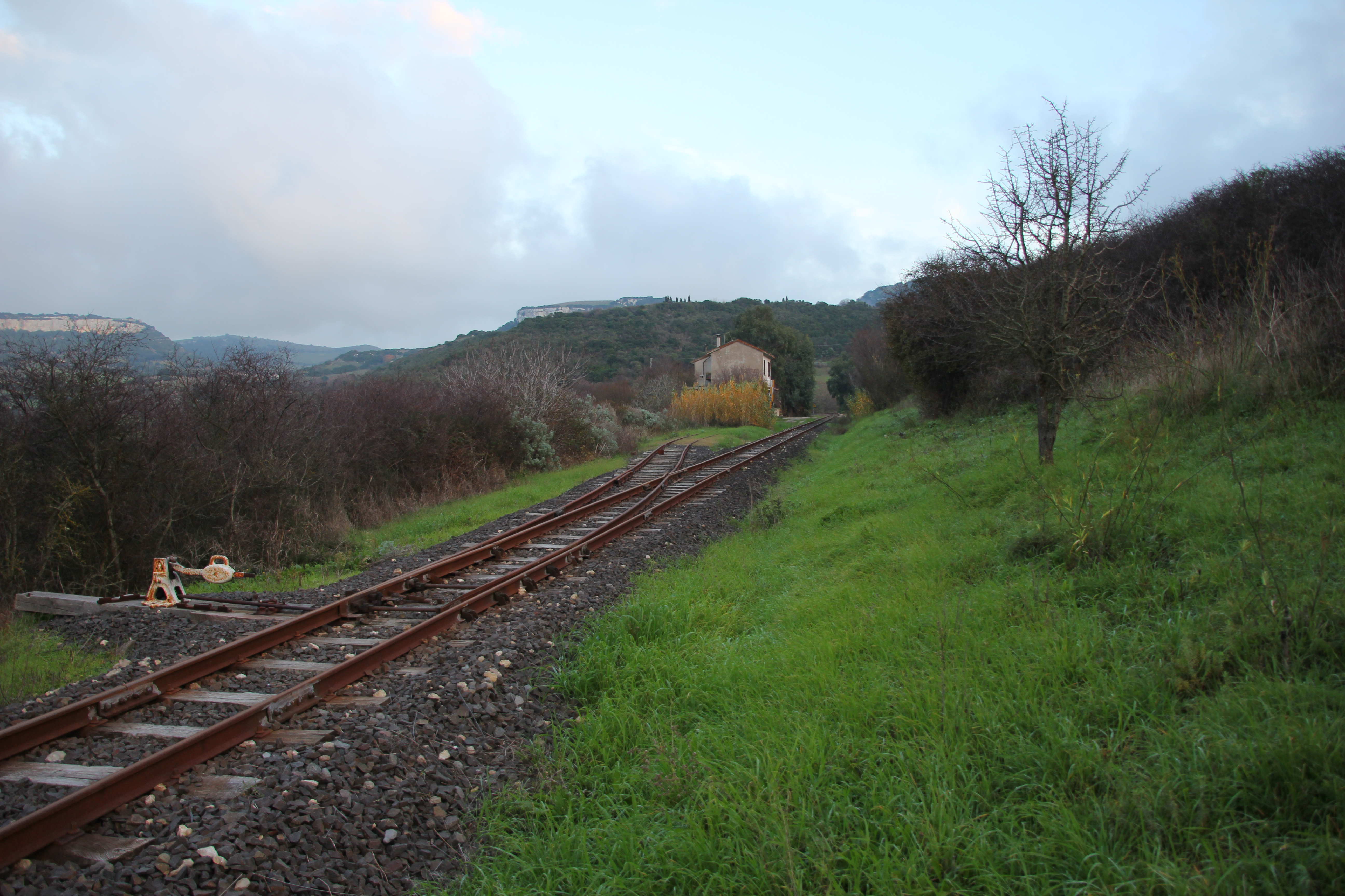 Sassari - Stazione ferroviaria di Achettas